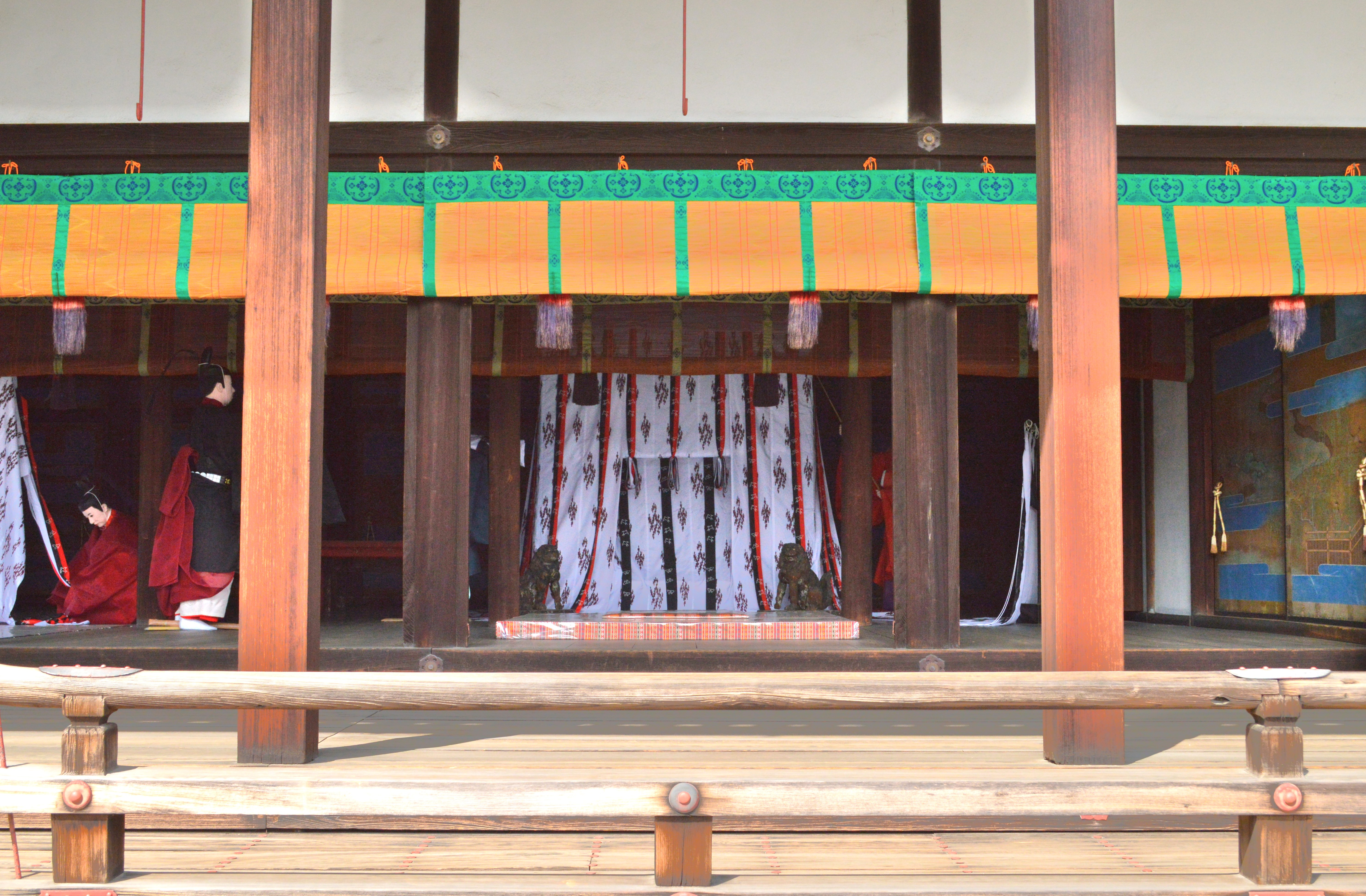 京都御所 清涼殿 昼の御座と御帳台